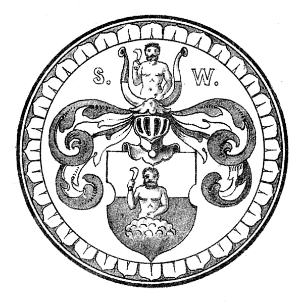 Wappen der Heilbronner Patrizier Weinmann